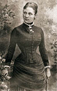 Jugendbildnis der deutschen Schriftstellerin Wilhelmine Heimburg (Bertha Behrens).